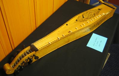 Langeleik - Norwegian instrument